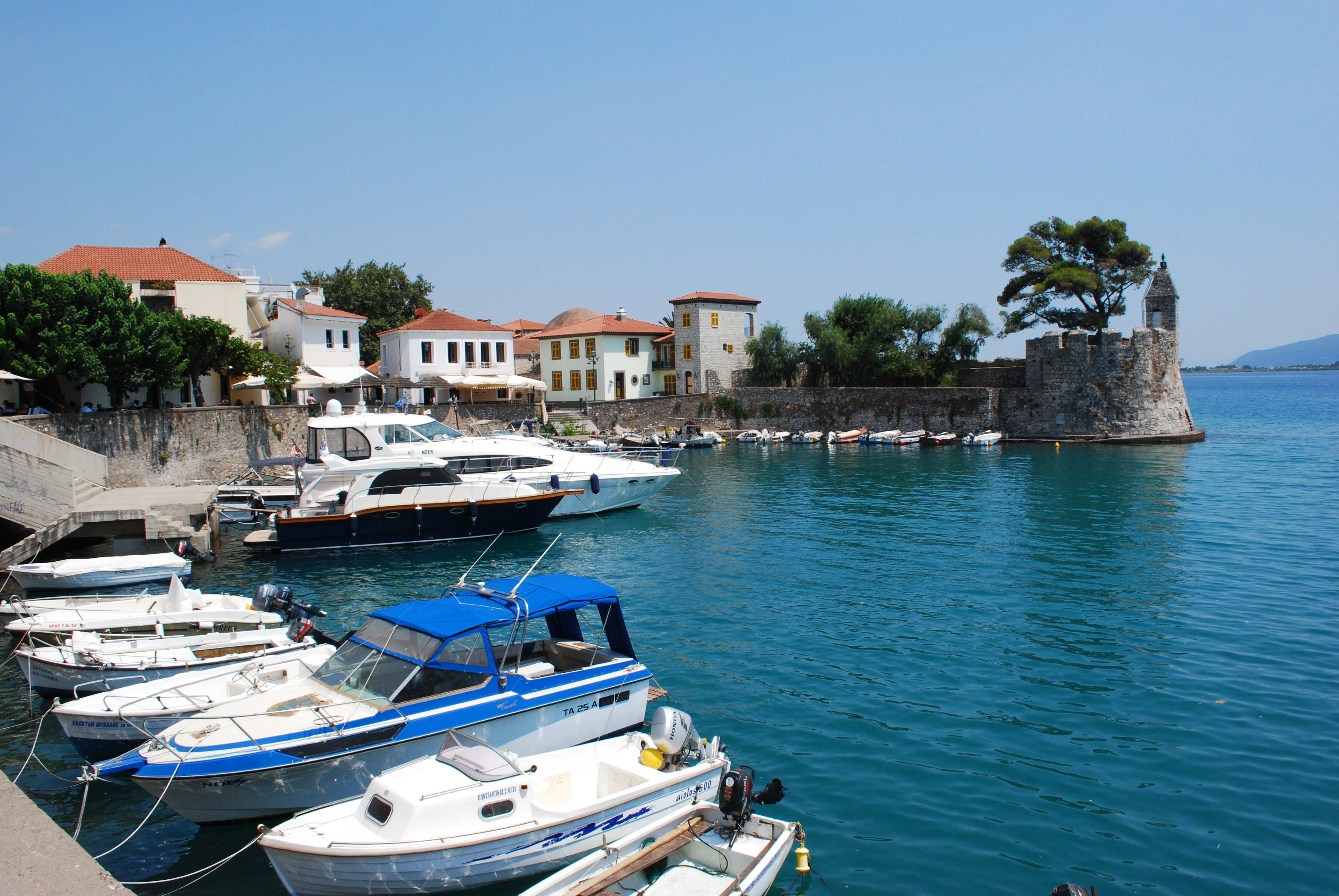 Vue du port de Nafpaktos.